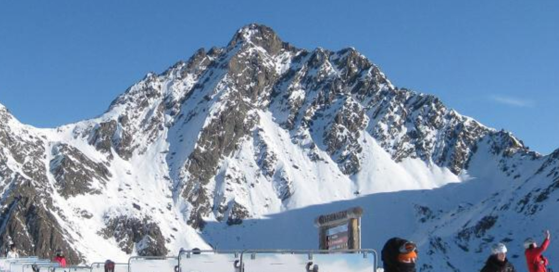 Vesulspitze from Idalpe (SW)